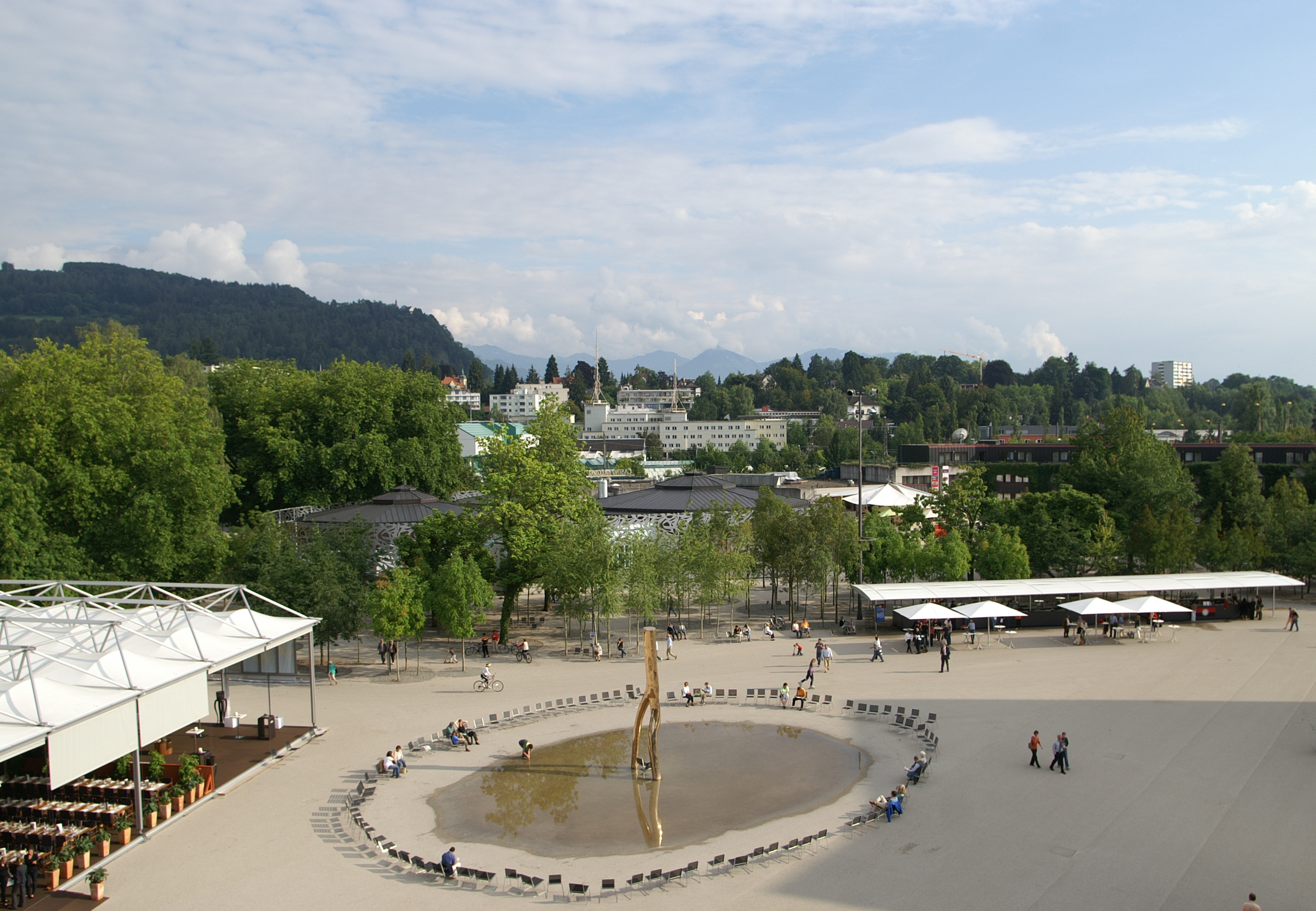 Platz vor dem Festspielhaus Bregenz am BodenseeGOTTFRIED BECHTOLD “Ready Maid”.